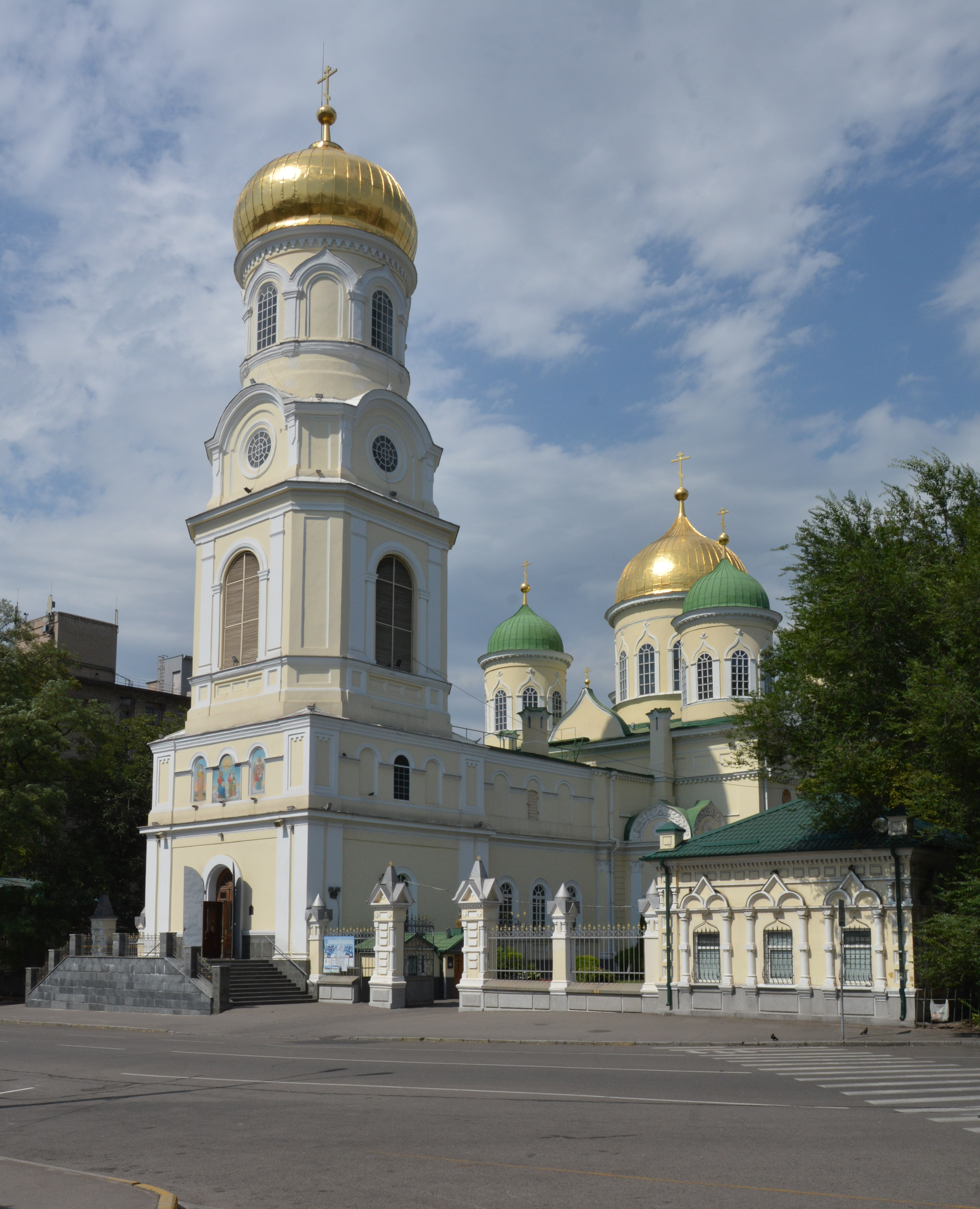 Свято-Троїцька церква, Дніпропетровськ, Червона пл., 7